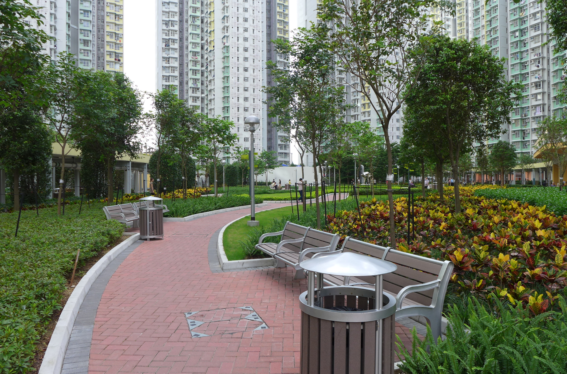 Tak Long Estate